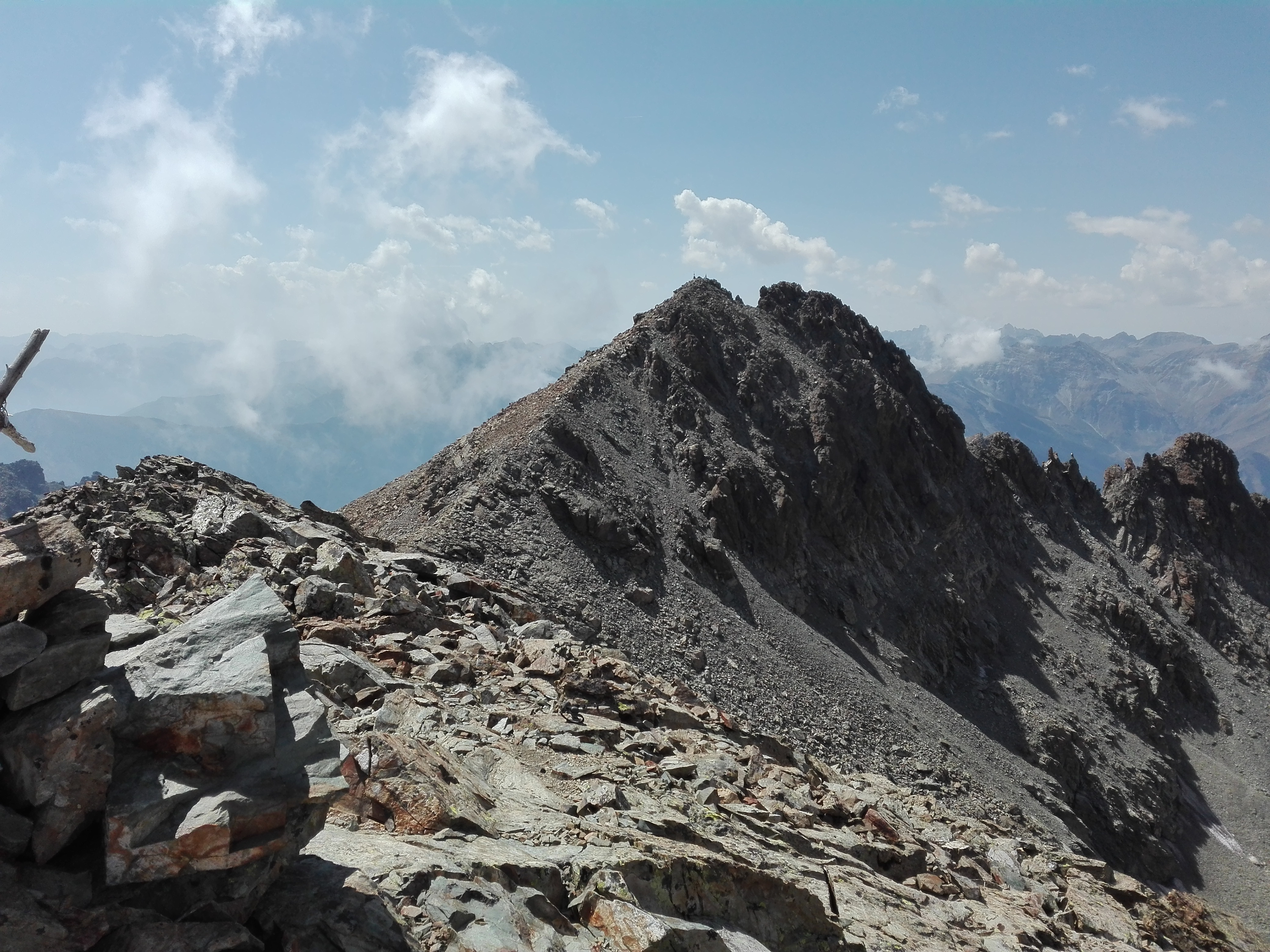 La Punta Dante vista dalla Punta Michelis. Nel mezzo il Colletto Dante